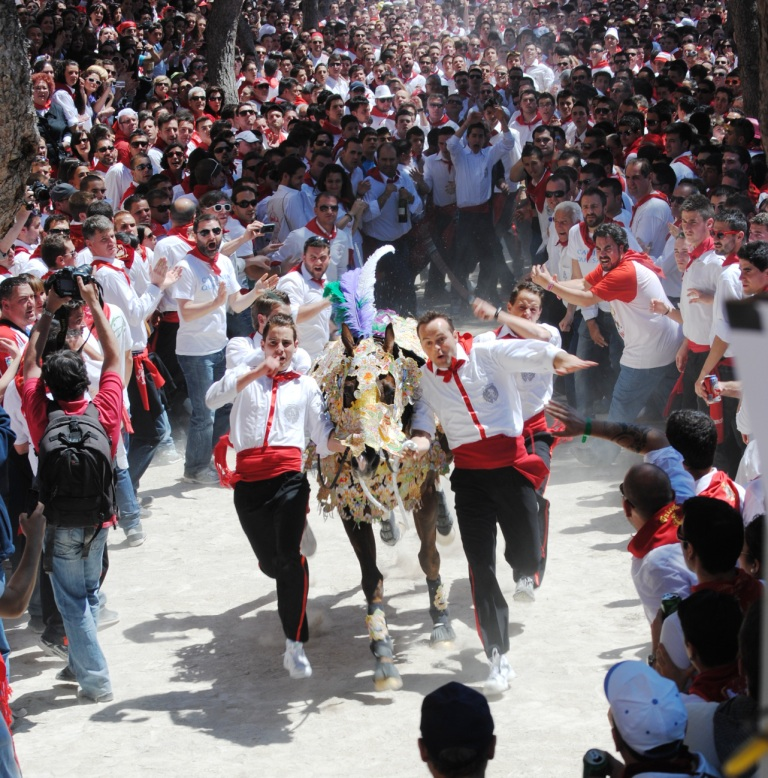 Caballos del Vino 2 de mayo